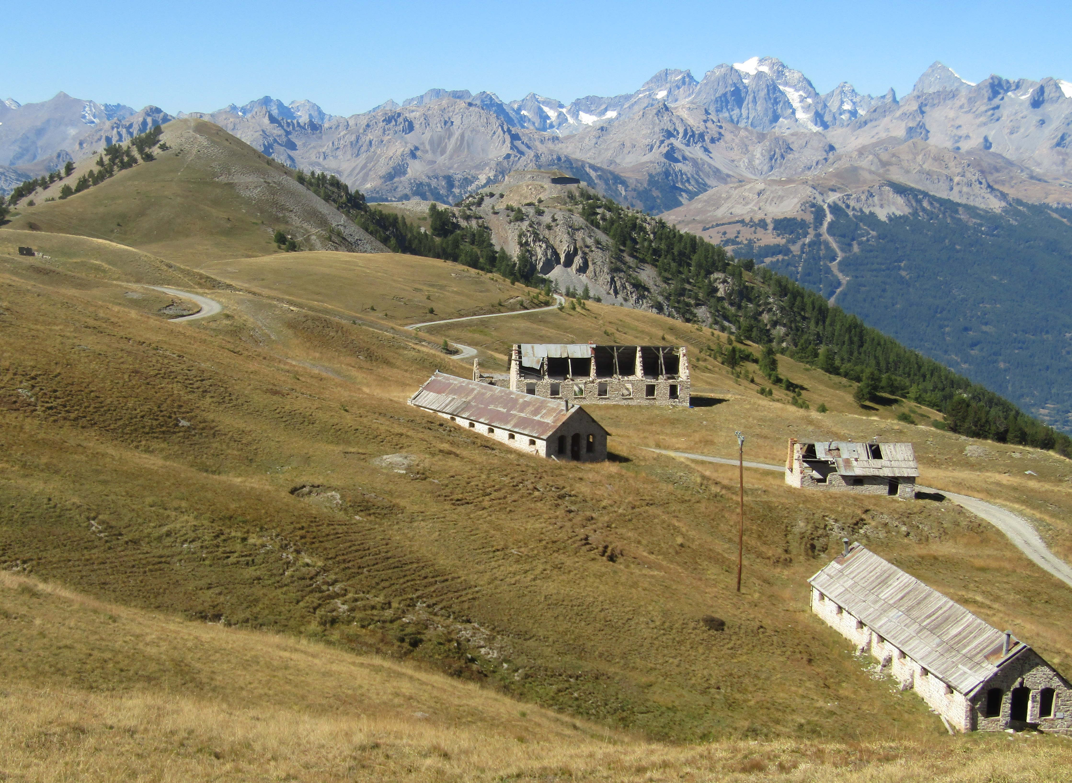 Vista verso il forte dell'Infernet dal Sommet des Anges (Alpi Cozie, Francia)